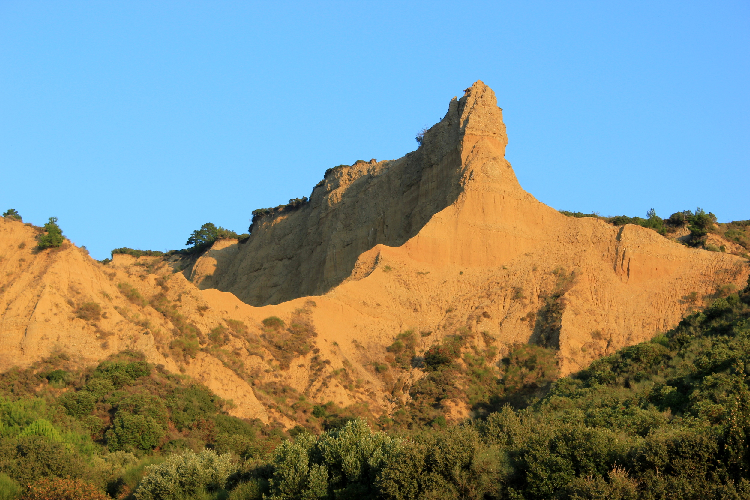 Die "Sphinx" in der ANZAC-Bucht auf der Halbinsel Gallipoli, Schauplatz der Schlacht von Gallipoli im Ersten Weltkrieg.